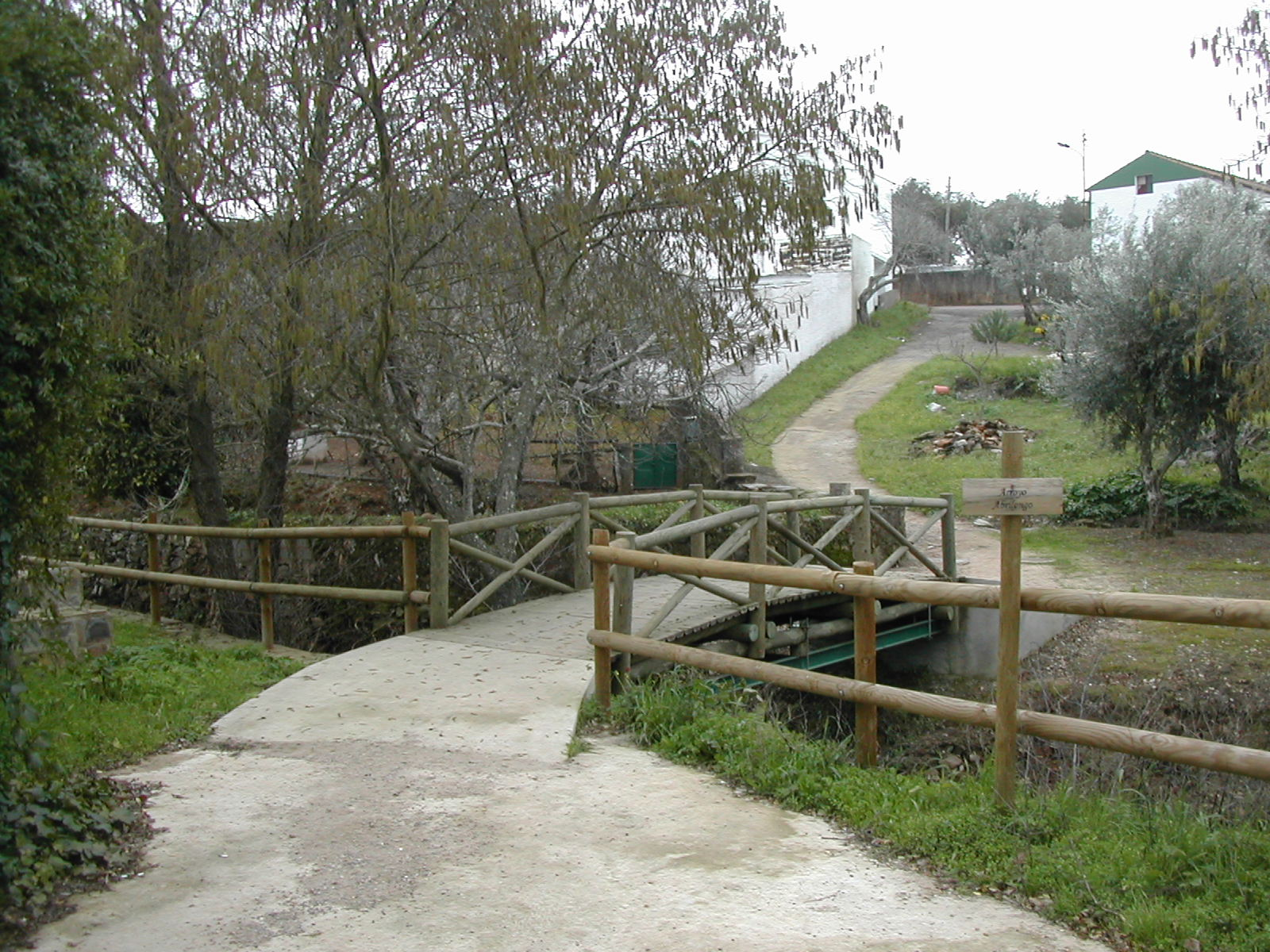 Aldeia de Marco / El Marco (Alentejo / Extremadura)